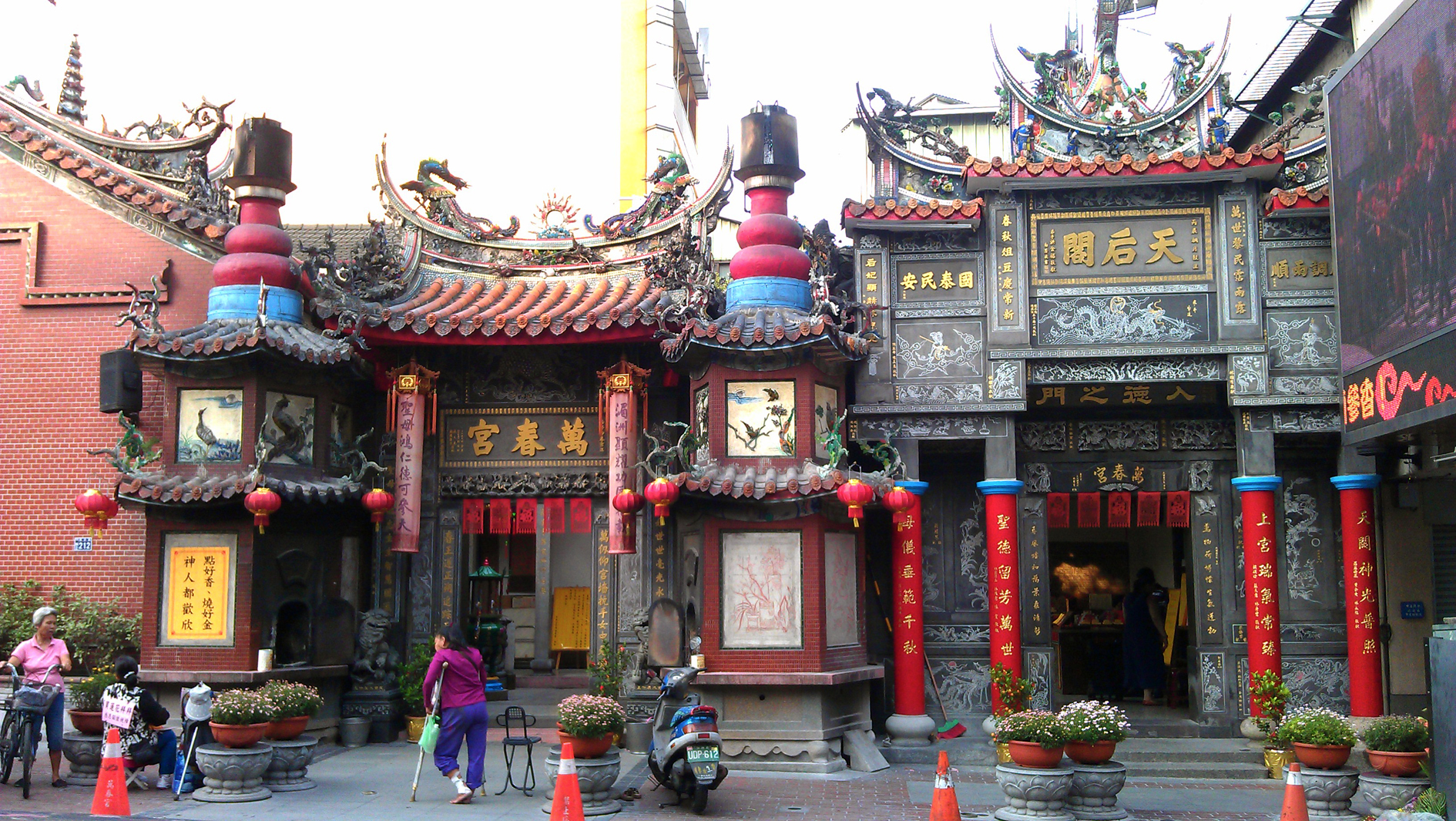 中文（台灣）: 台中萬春宮